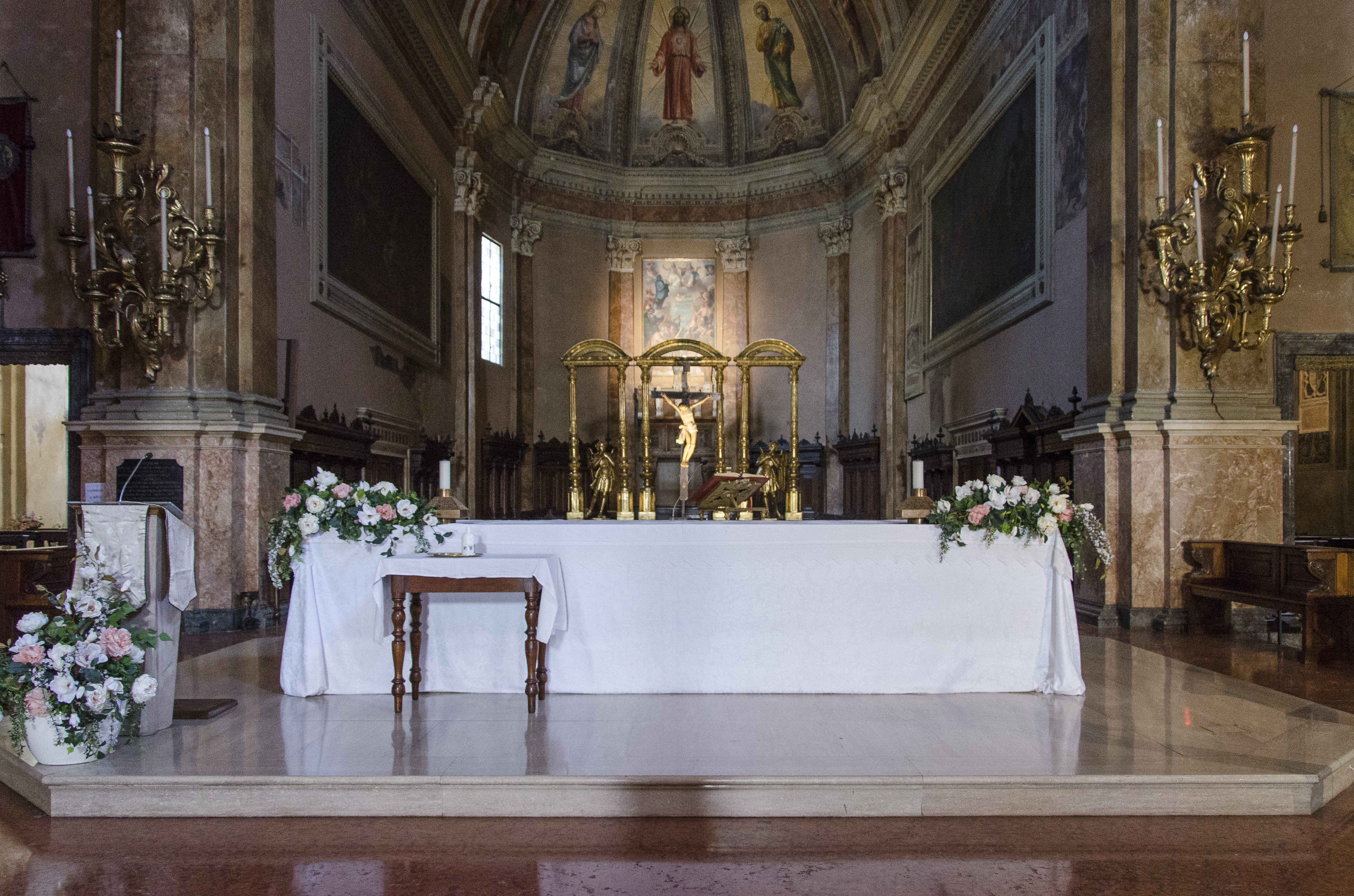 Interno della chiesa di Sant'Eufemia a Verona